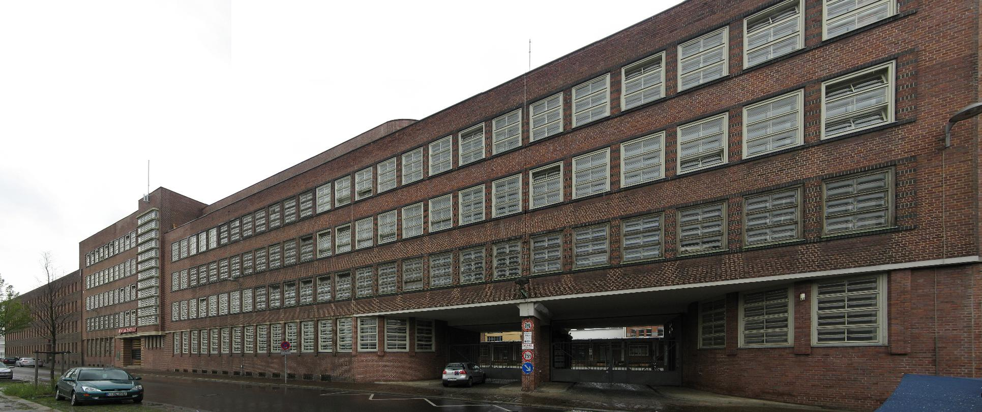 Konsumzentrale in Leipzig-Plagwitz, Industriestraße 85–95, erbaut von Fritz Höger 1929–1932